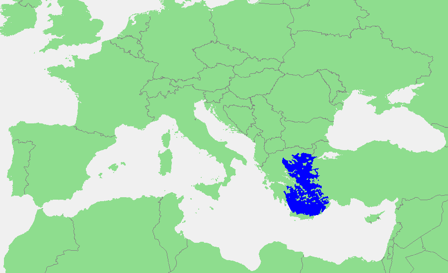 In dutch: Locatie Egeische Zee